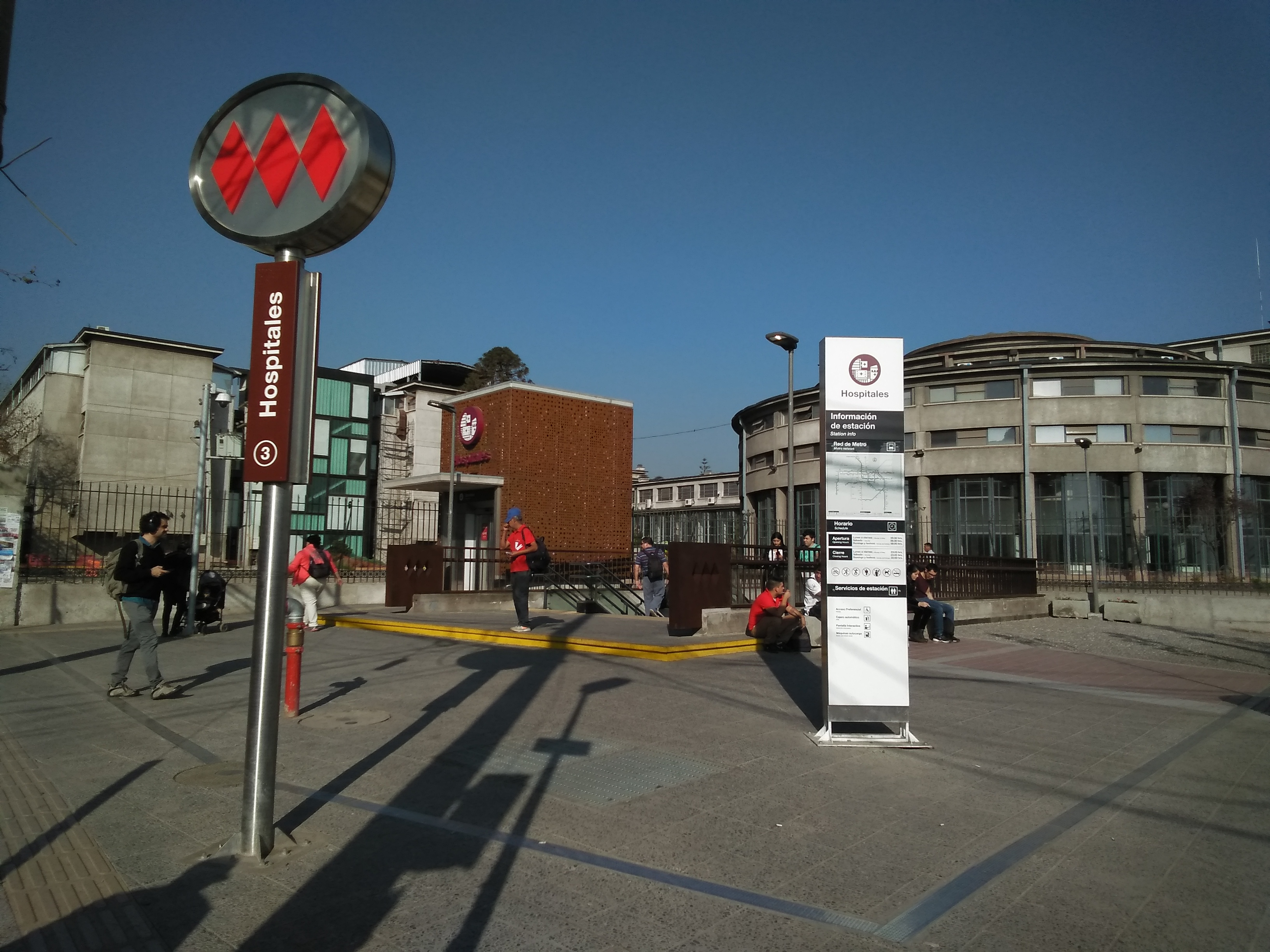 Acceso de la estación Hospitales de la Línea 3 del Metro de Santiago.